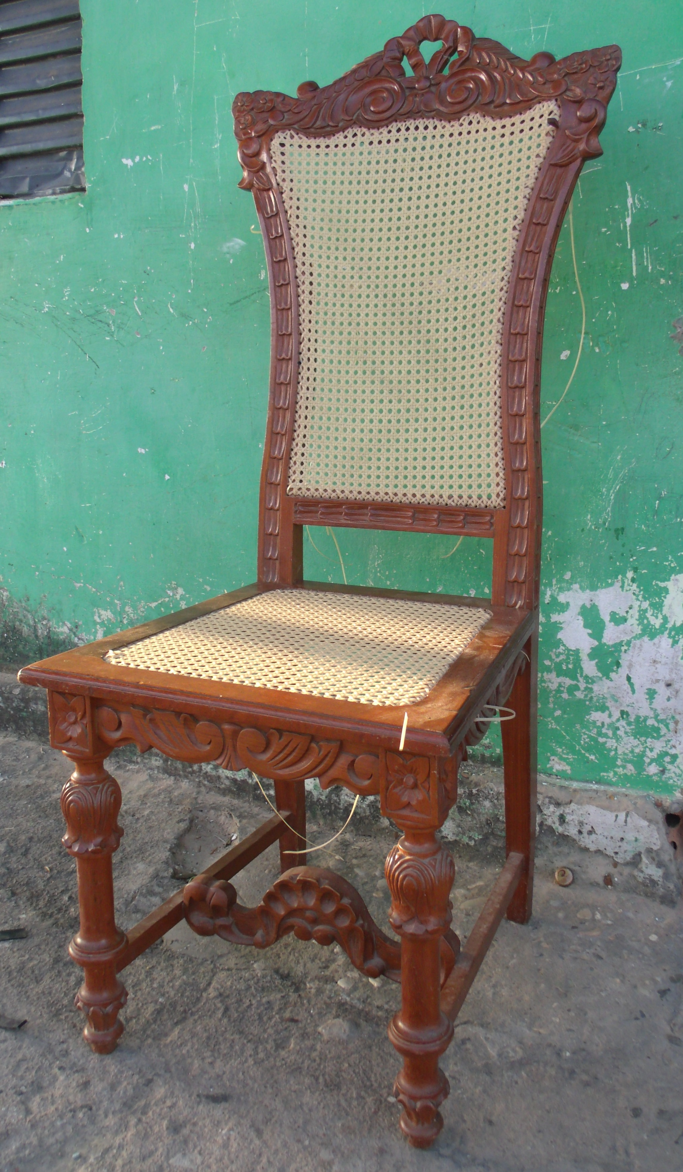 Cadeira e madeira entalhada no Piauí.